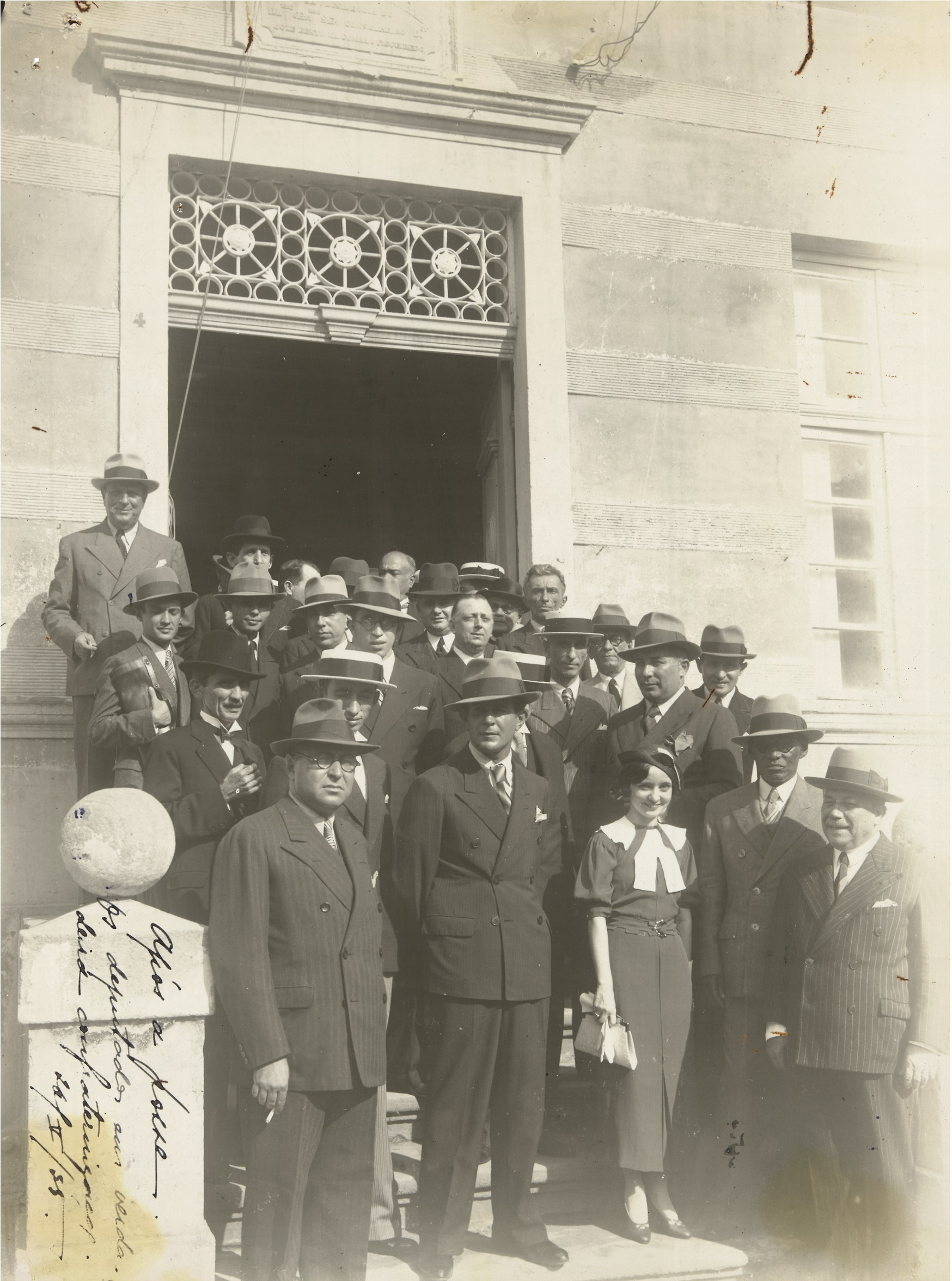 Maria José Salgado Lages, primeira mulher eleita deputada da Assembleia Legislativa do Estado de Alagoas, e deputados após cerimônia de posse em Maceió. Fundo: Federação Brasileira pelo Progresso Feminino.